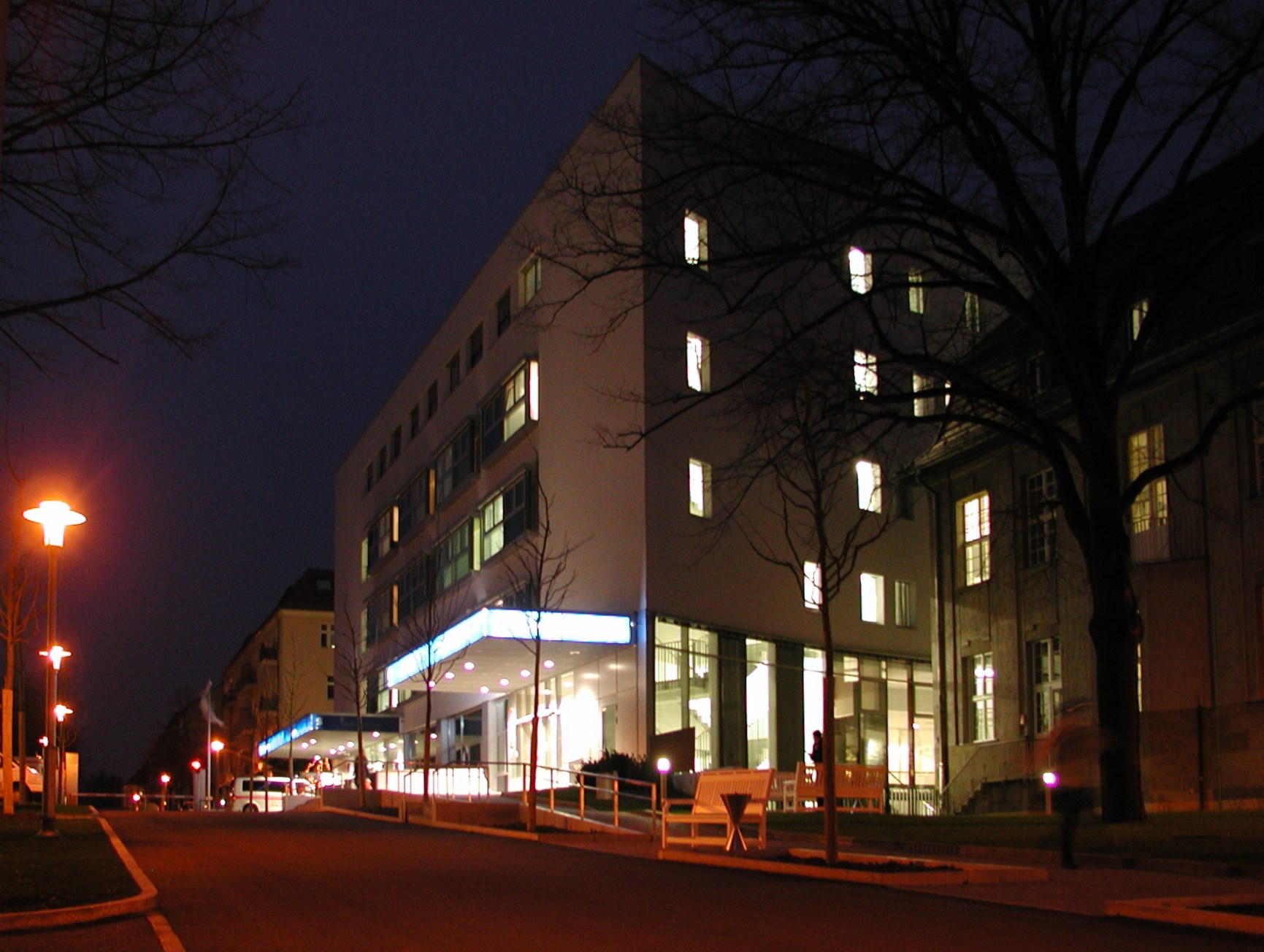 neues Hauptgebäude des OZK an der Fanningerstraße abends